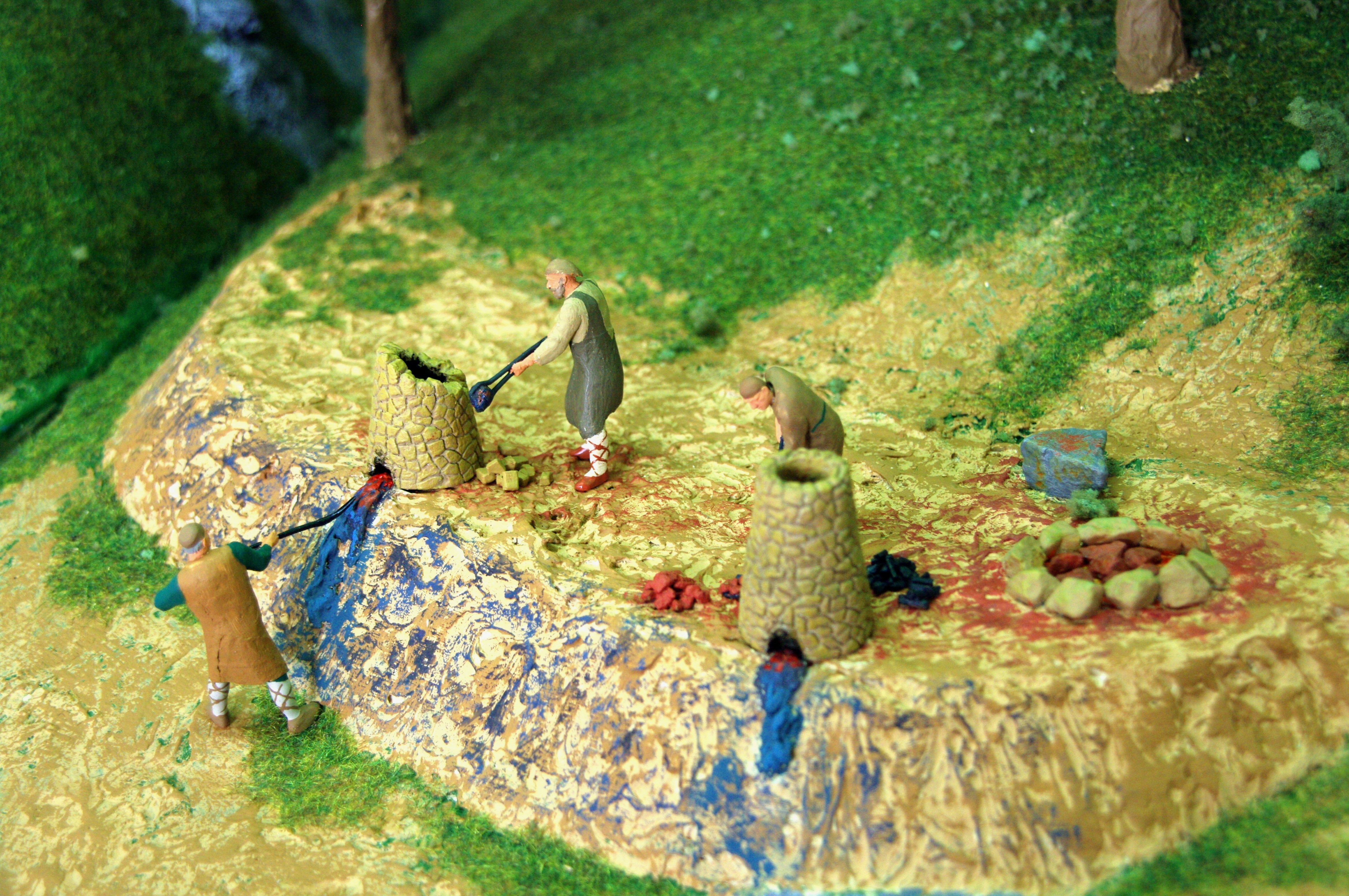 Ferrería de monte o haizeola (maqueta del Museo de la Minería del País Vasco)